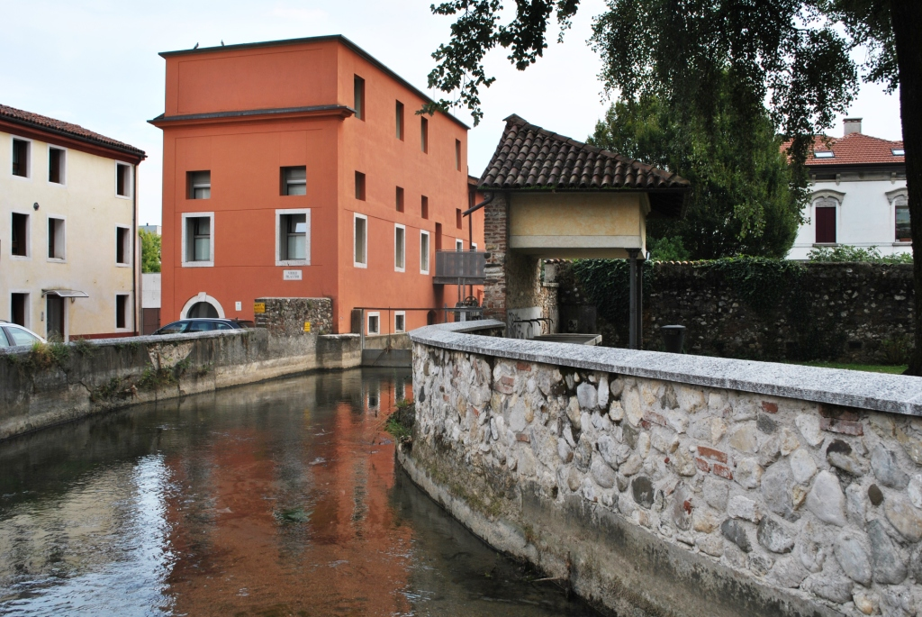 Lavatoio antico This is a photo of a monument which is part of cultural heritage of Italy.